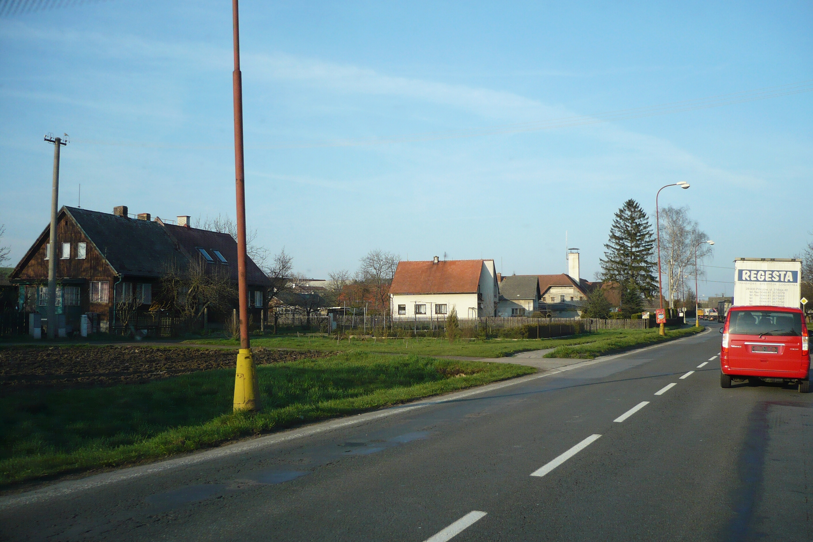 Svinišťany